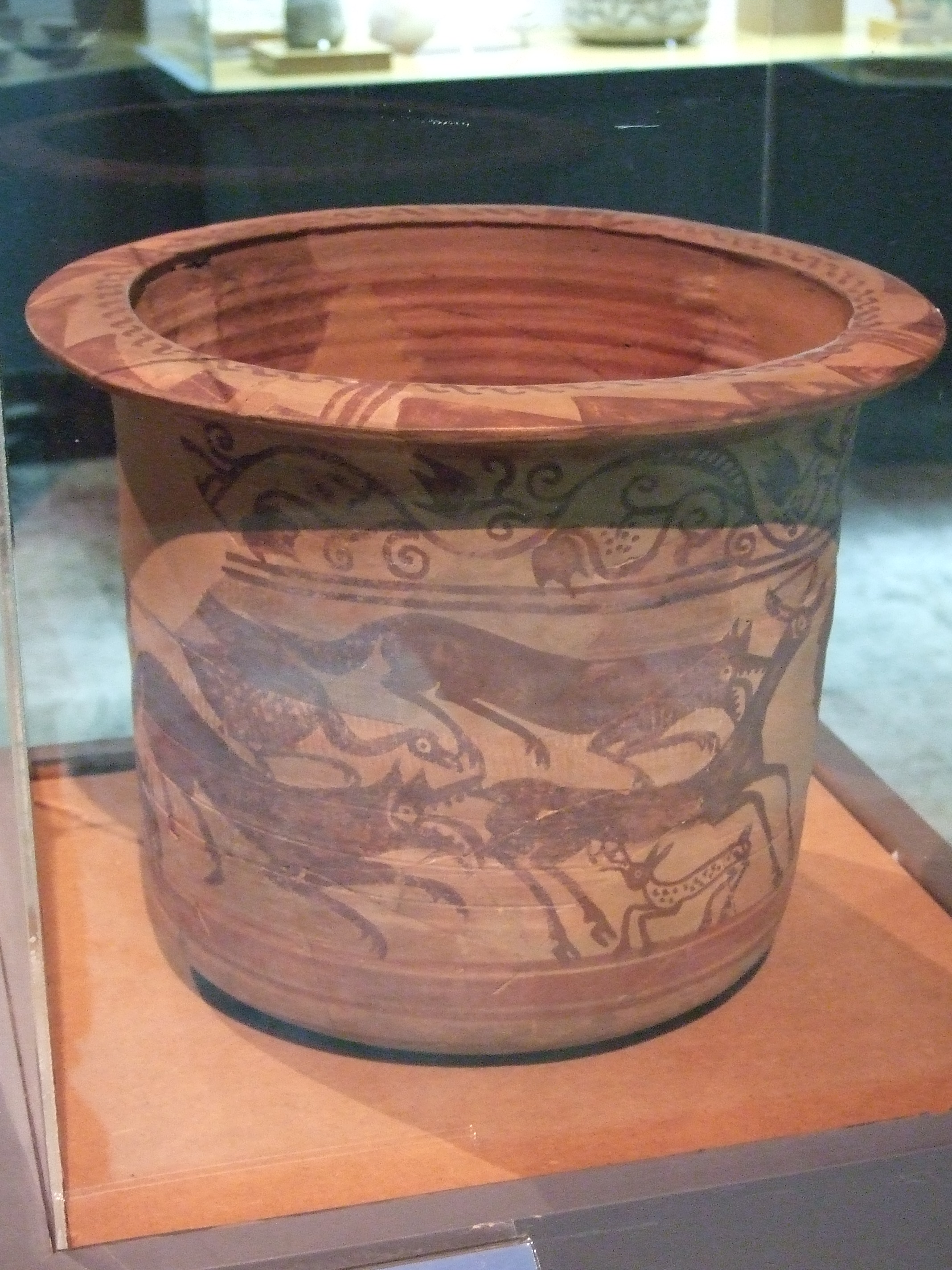 Kalathos ibérico decorado. Cueva del Cabuchico (Azuara, Zaragoza) Siglo I adC. Museo de Zaragoza